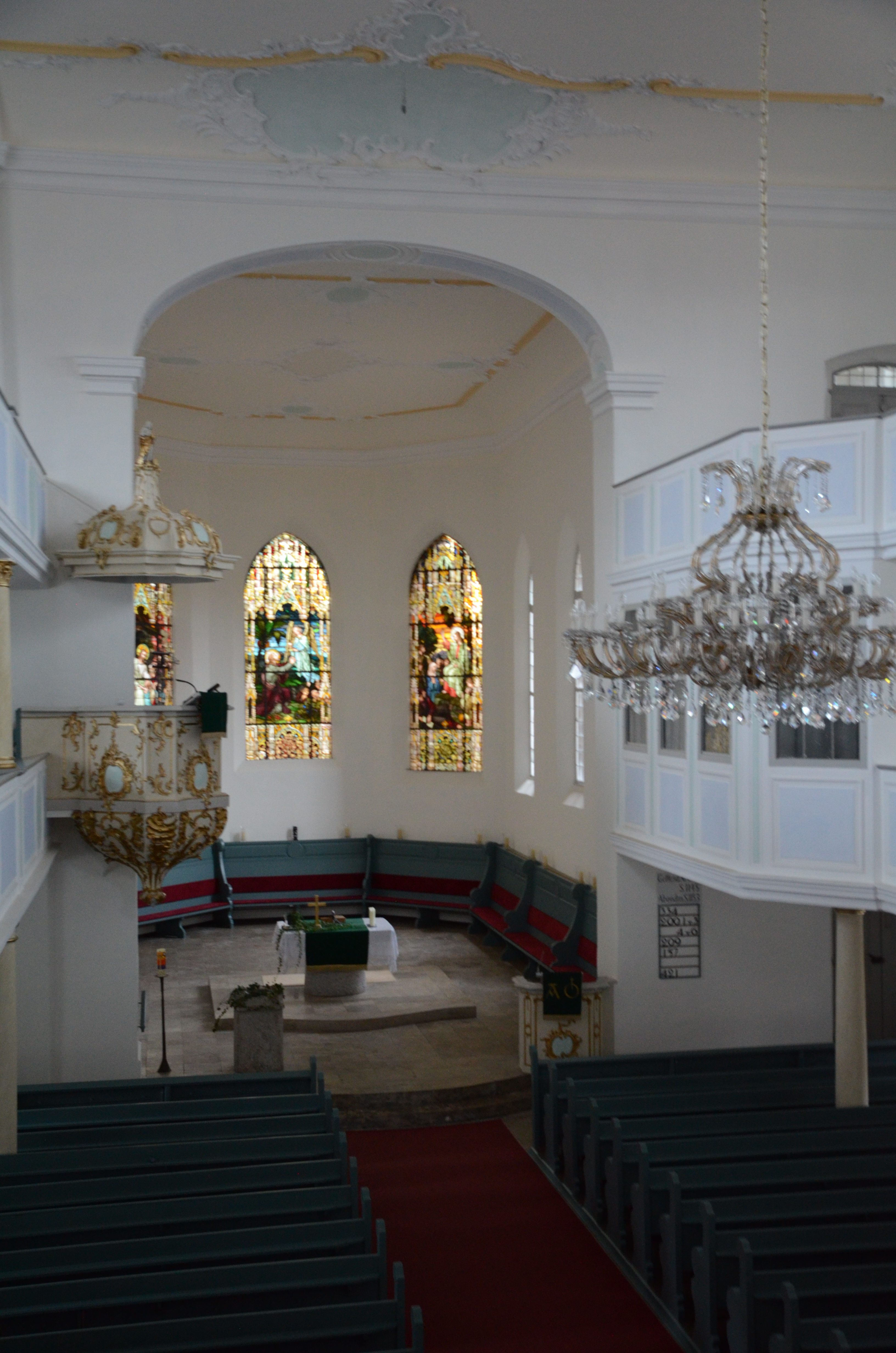 Stadtpfarrkirche St. Johannis in Bad Rodach